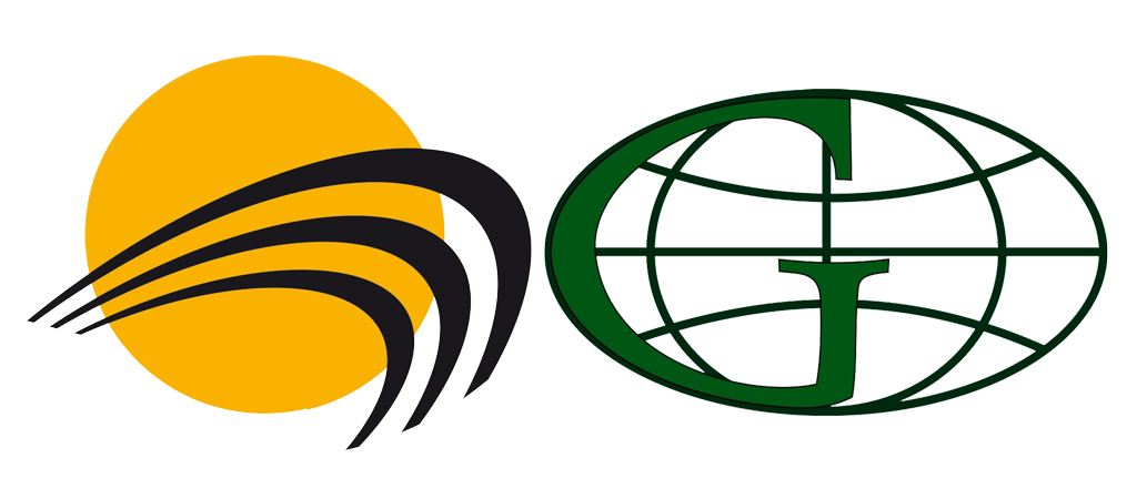 Логотип группы компаний "УкрАгроКом" и "Гермес-Трейдинг" в png